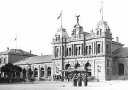 Mainz Main Station at Berdellés time